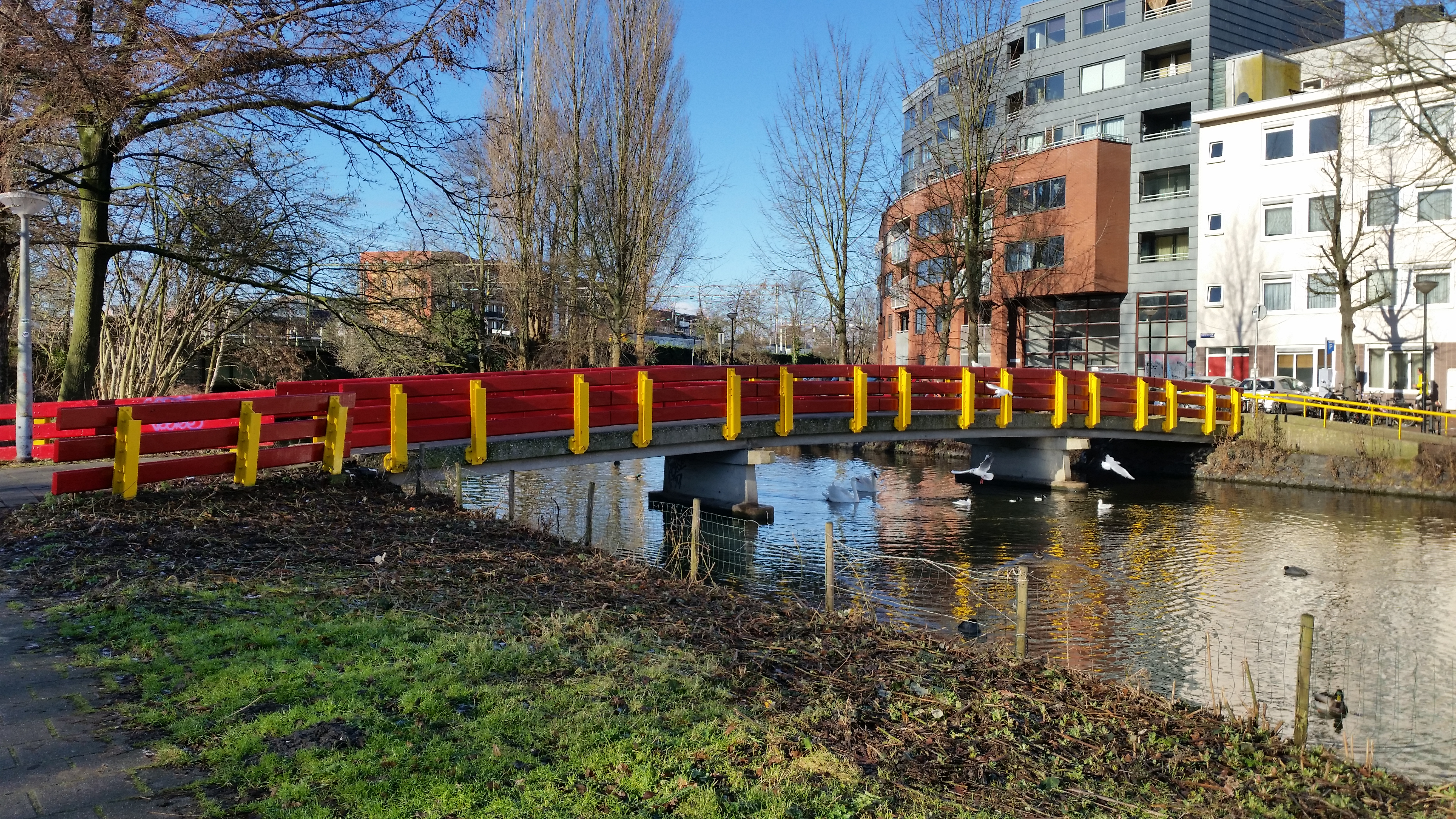 Zijaanzicht van Brug 115 (in Amsterdam) richting Celebesstraat